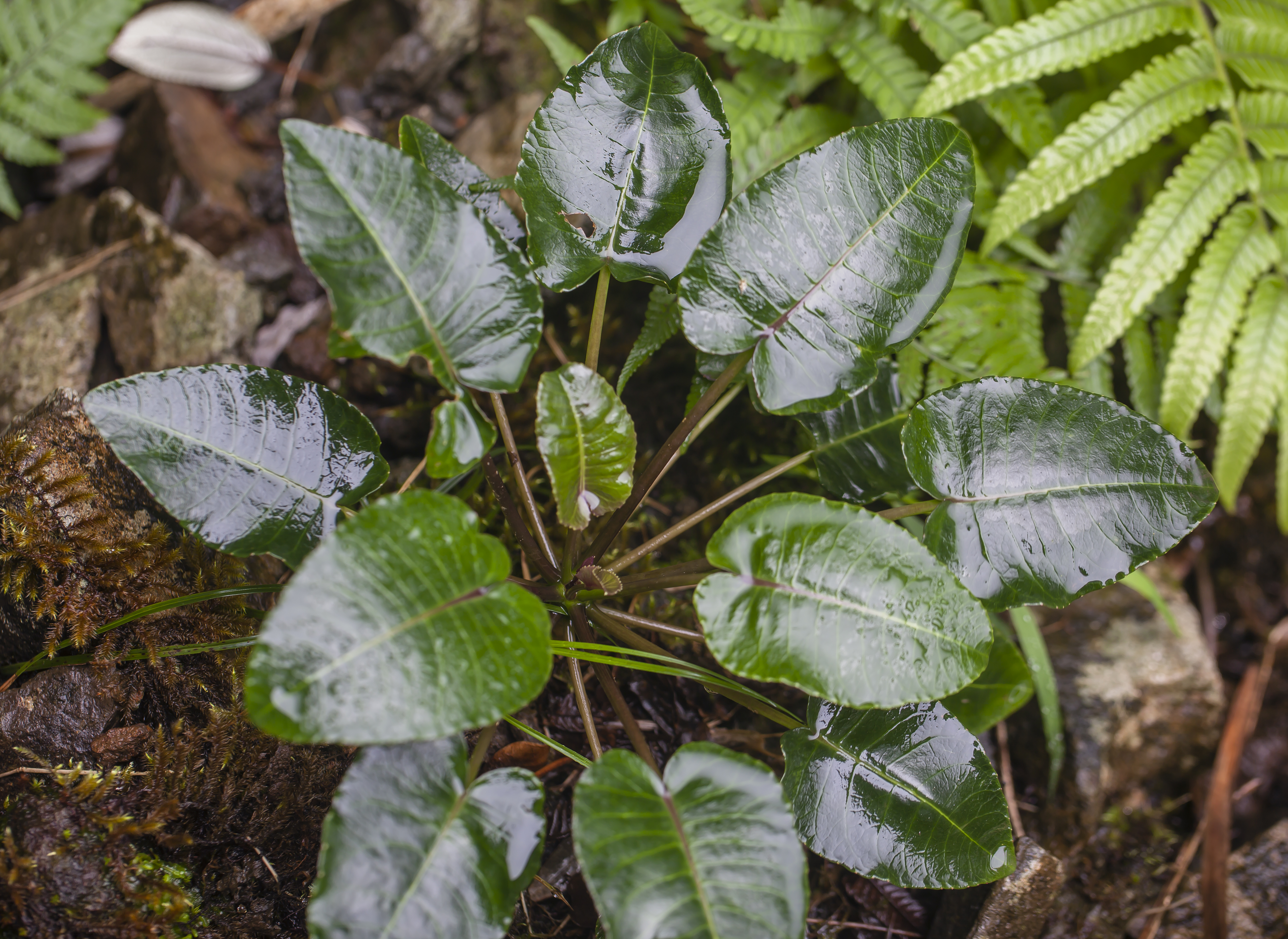 Cyanea asarifolia (haha)